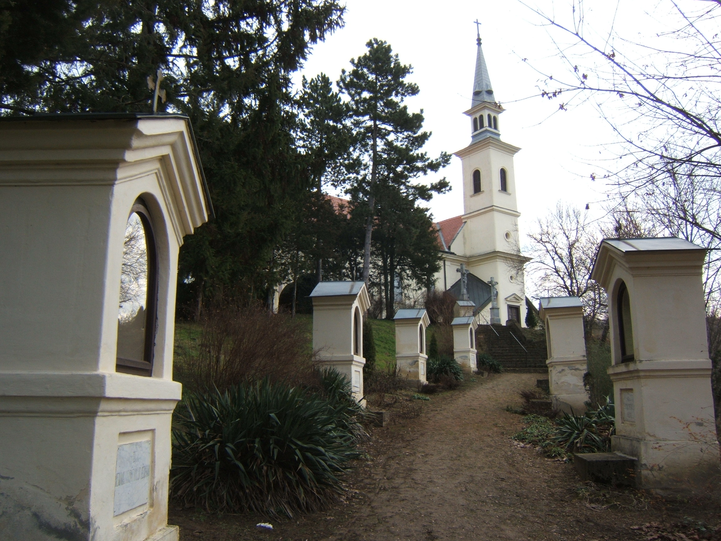 Lengyeltóti, kálvária